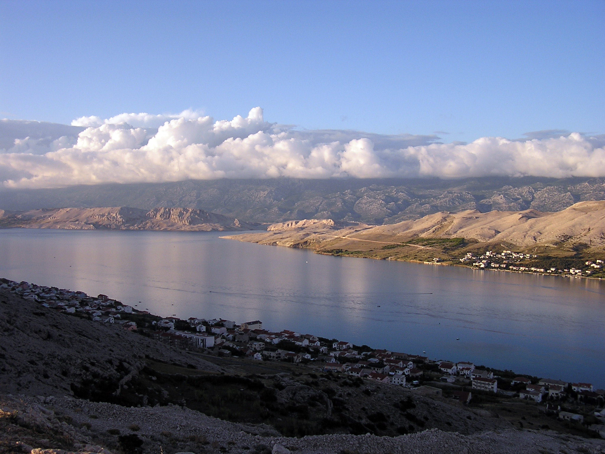 Island Pag